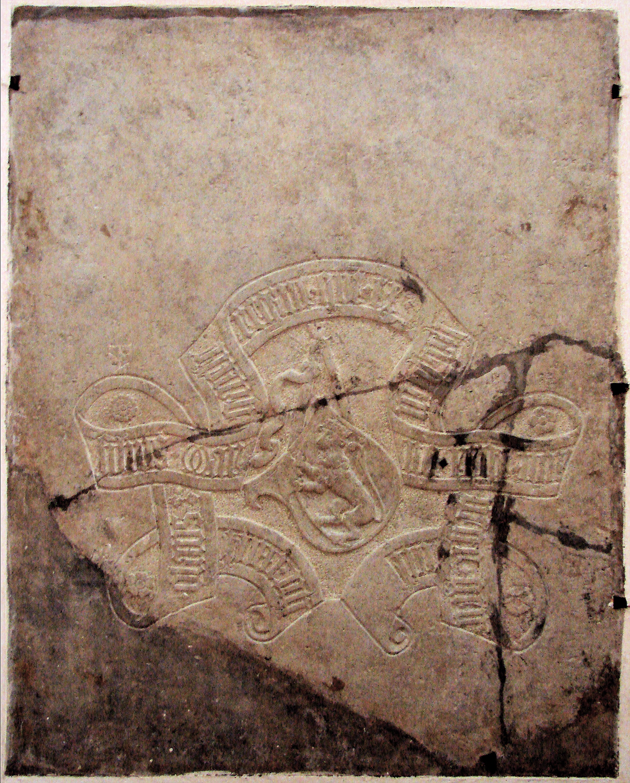 Oluf II af Danmark, Olav IV af Norge, prins af Sverige, rester af gravmindesten med den norske løve, Sorø Klosterkirke, Sjælland